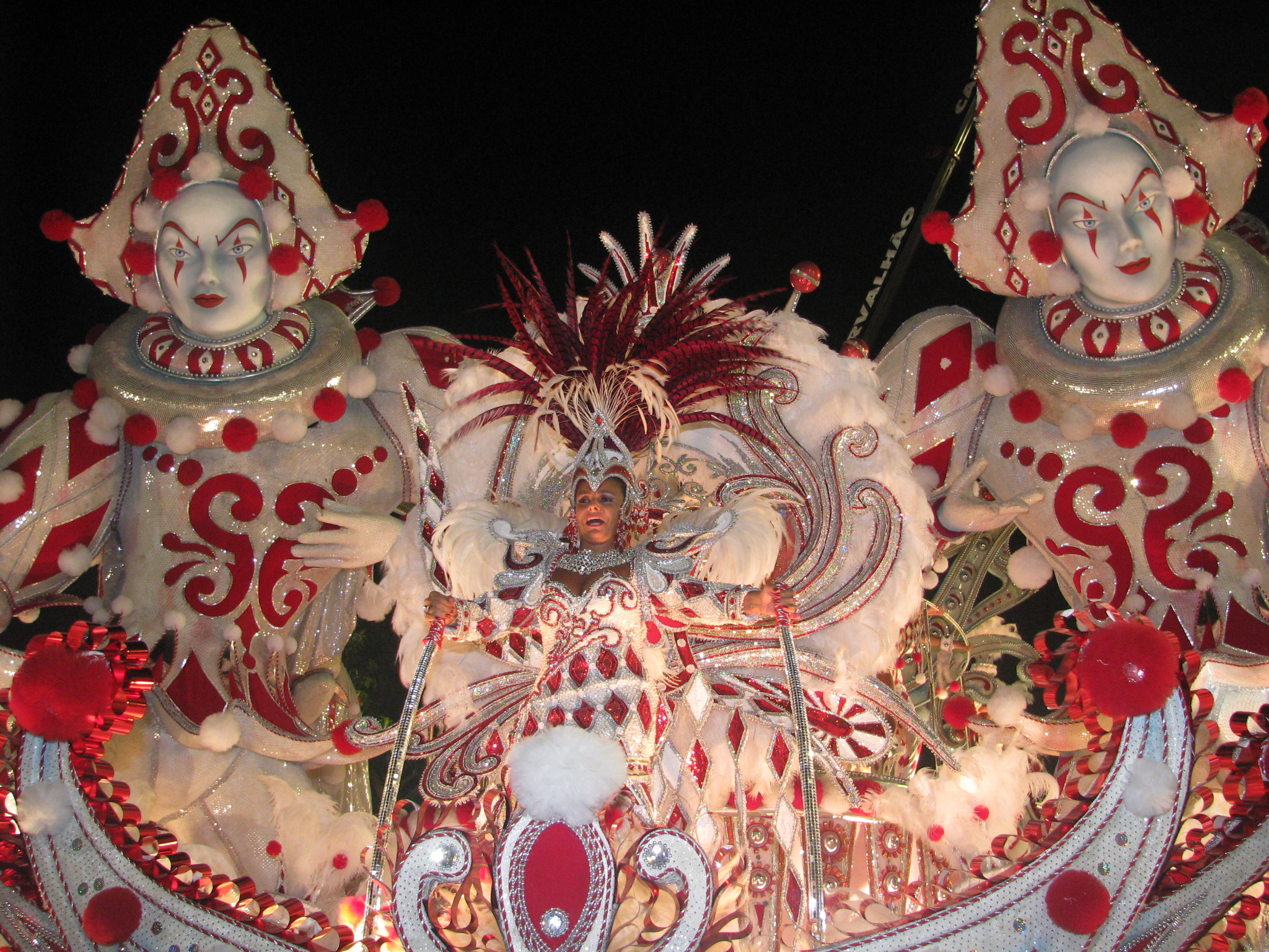 Salgueiro-45.JPG